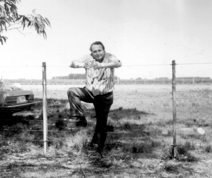 Dr. Mario Carminatti, intendente de Fray Bentos a fines del siglo XX. Cortesía del Usuario:Trek57.